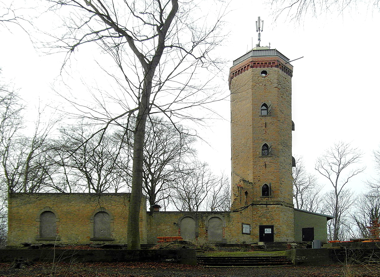 Der Burgbergturm Gehrden in der Region Hannover in Niedersachsen von Osten aufgenommen